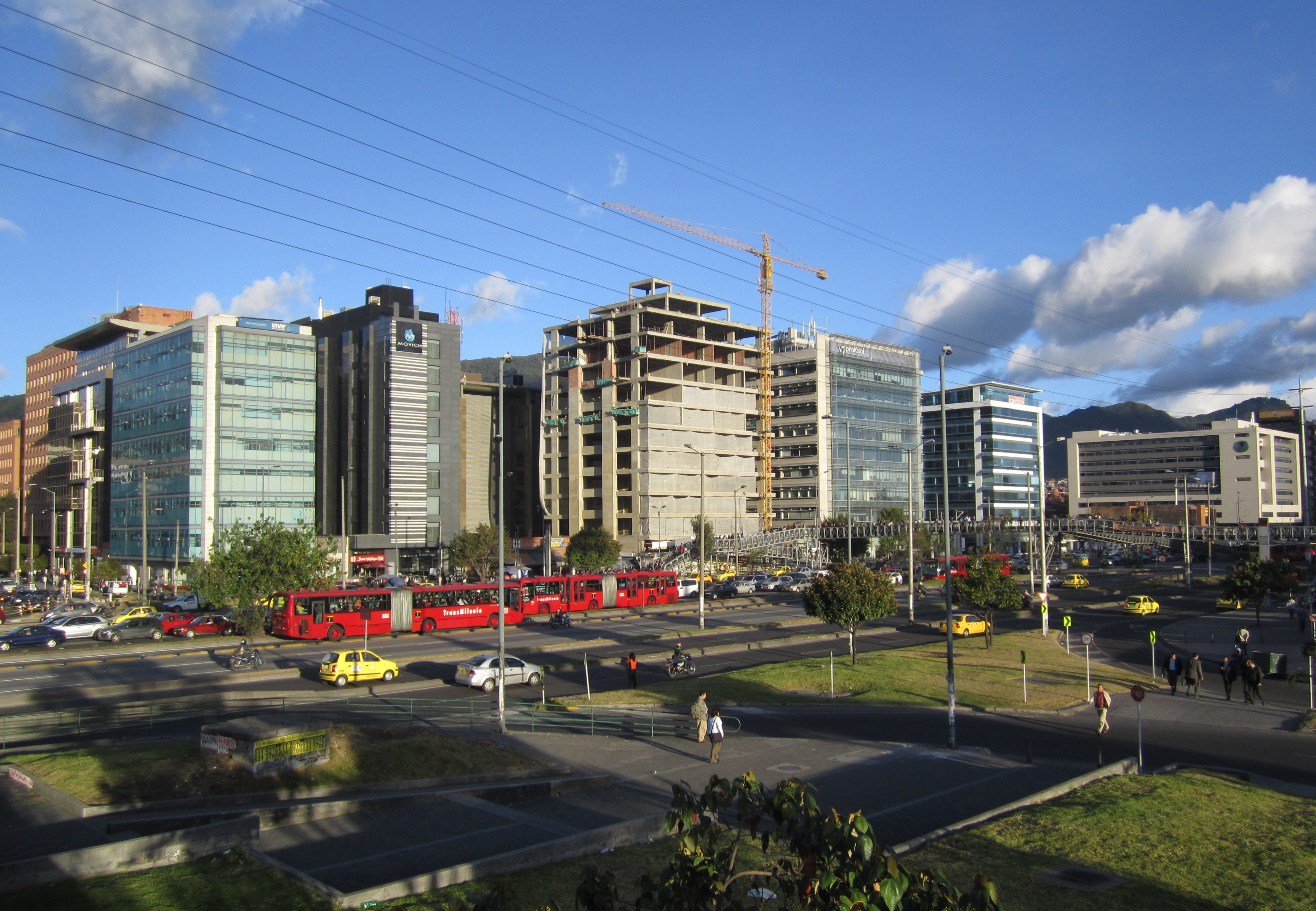 Autopista Norte con calle 100 TransMilenio, norte de Bogotá.